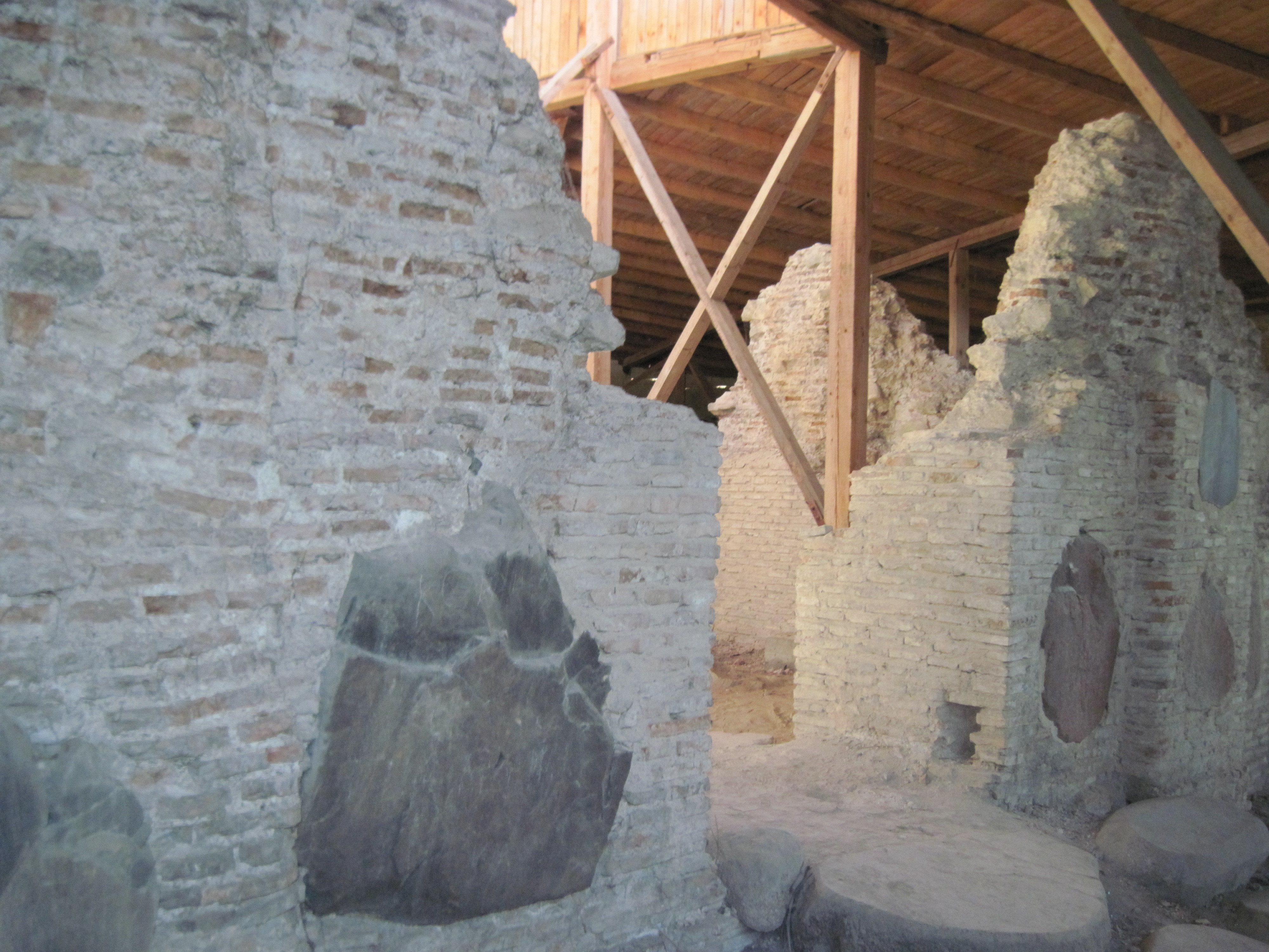 Рэшткі Ніжняй царквы ў Гродне. 12 ст.